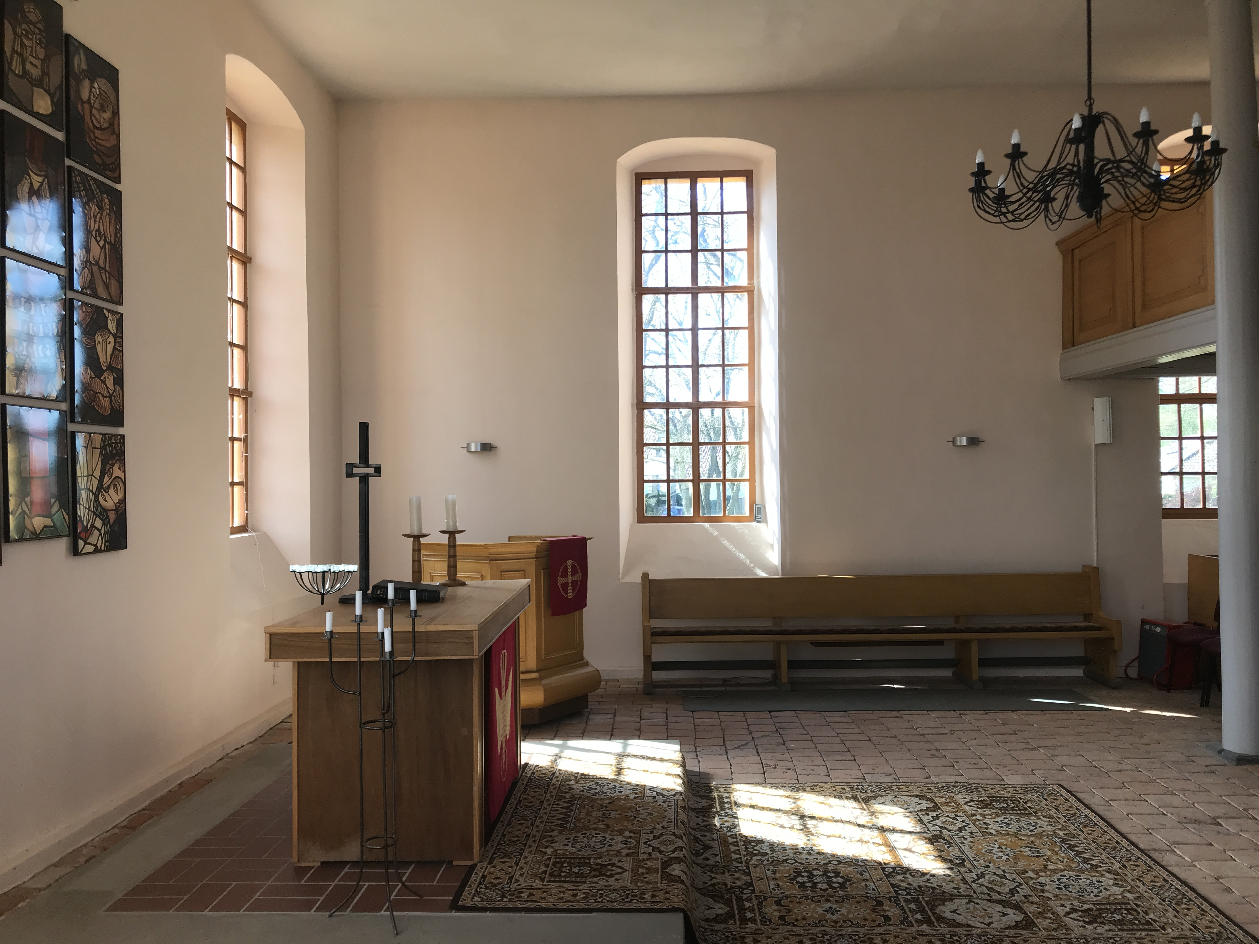 Die Dorfkirche Wernsdorf ist eine Saalkirche aus dem Jahren 1801 bis 1803 in Königs Wusterhausen. Im Innern steht unter anderem eine Hufeisenempore.